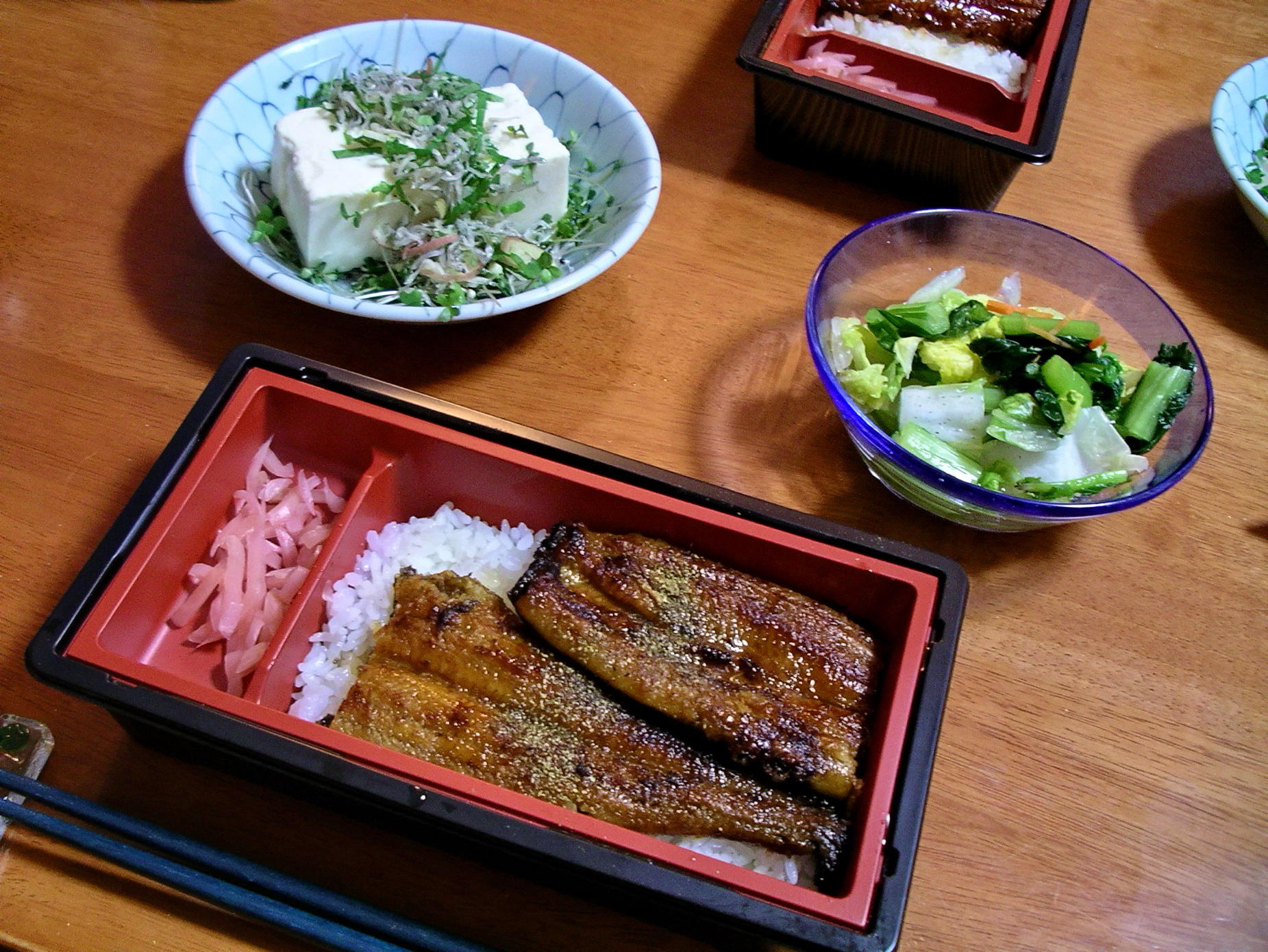 Unajuu (grilled eel over rice). Blue Lotus